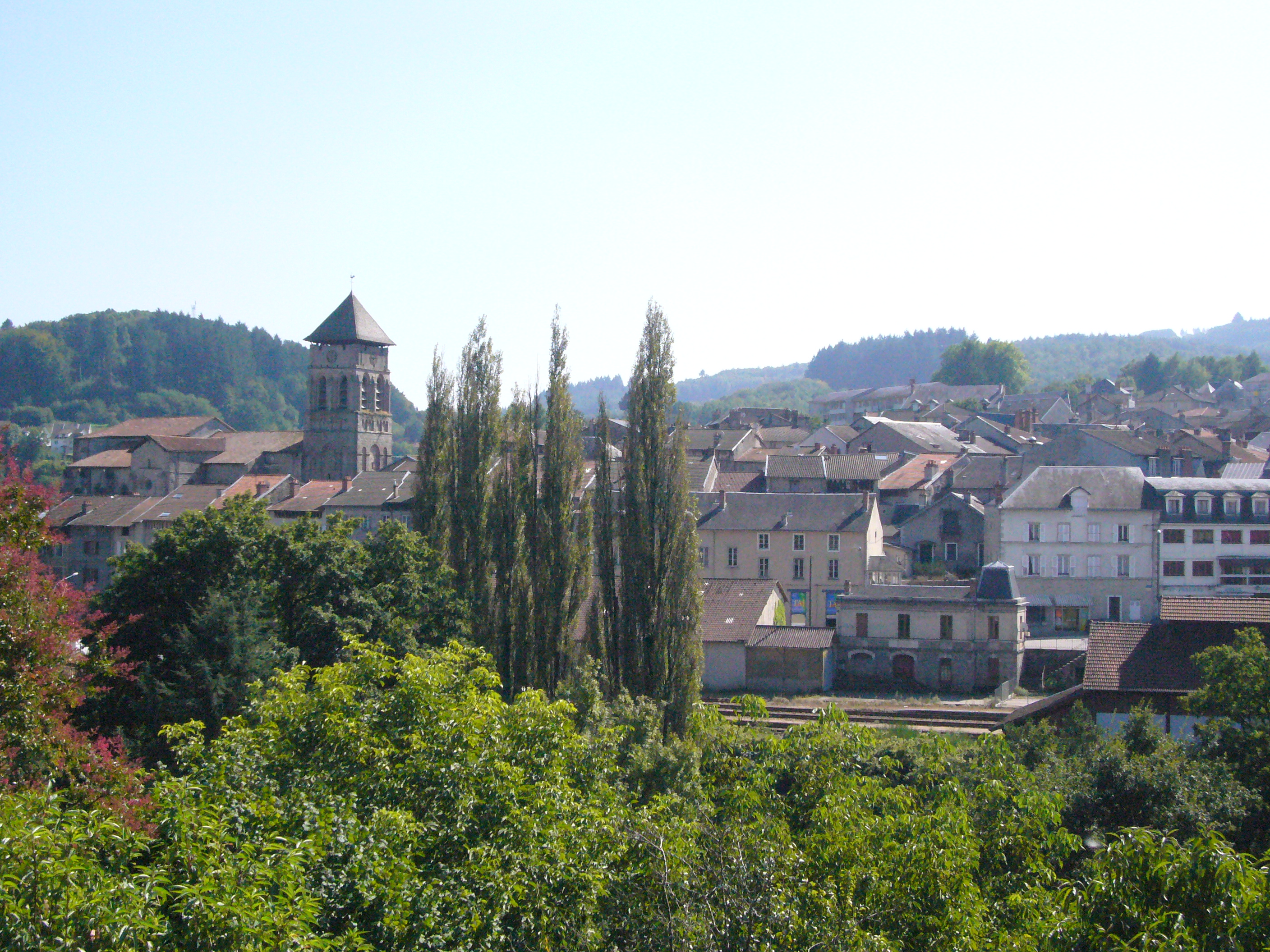 Vue d'Eymoutiers (Haute-Vienne, France)